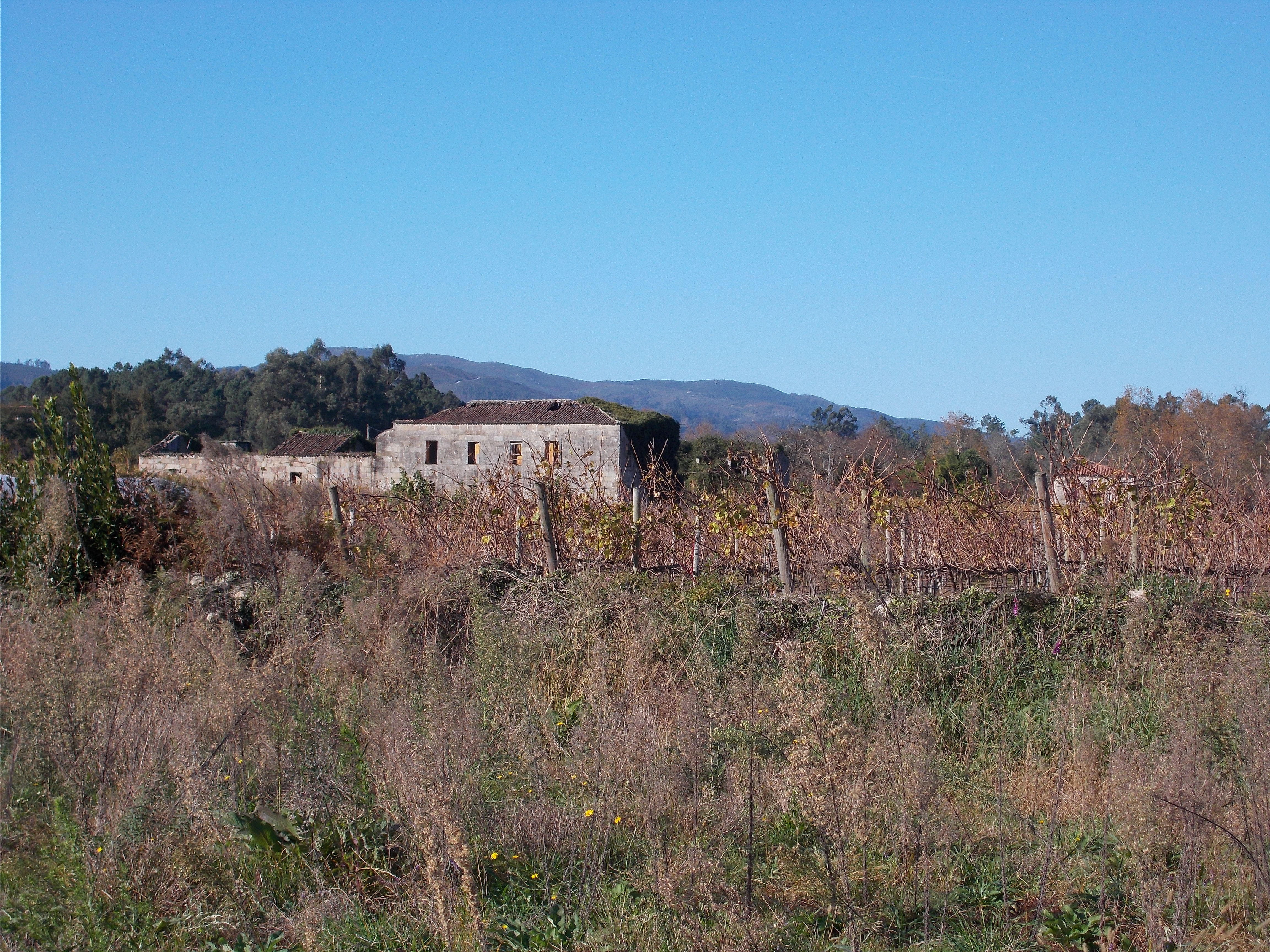 Paço de D. Sapo (Gonçalo de Abreu)de Coucieiro